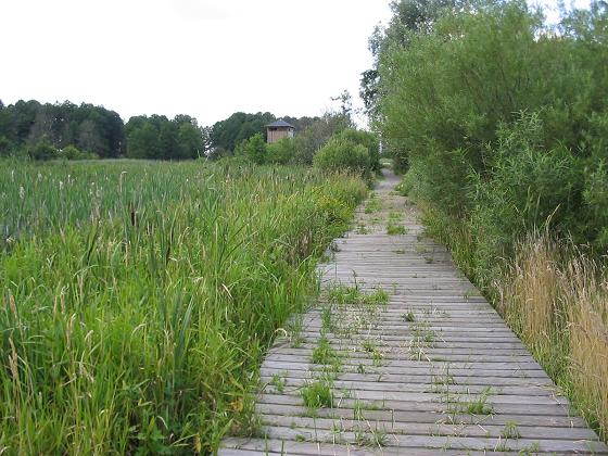 Bohlenweg in Stangenhagen, Brandenburg